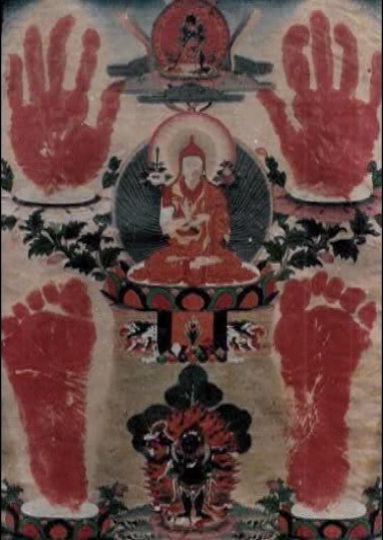 Конгтрул Лодро Тайе